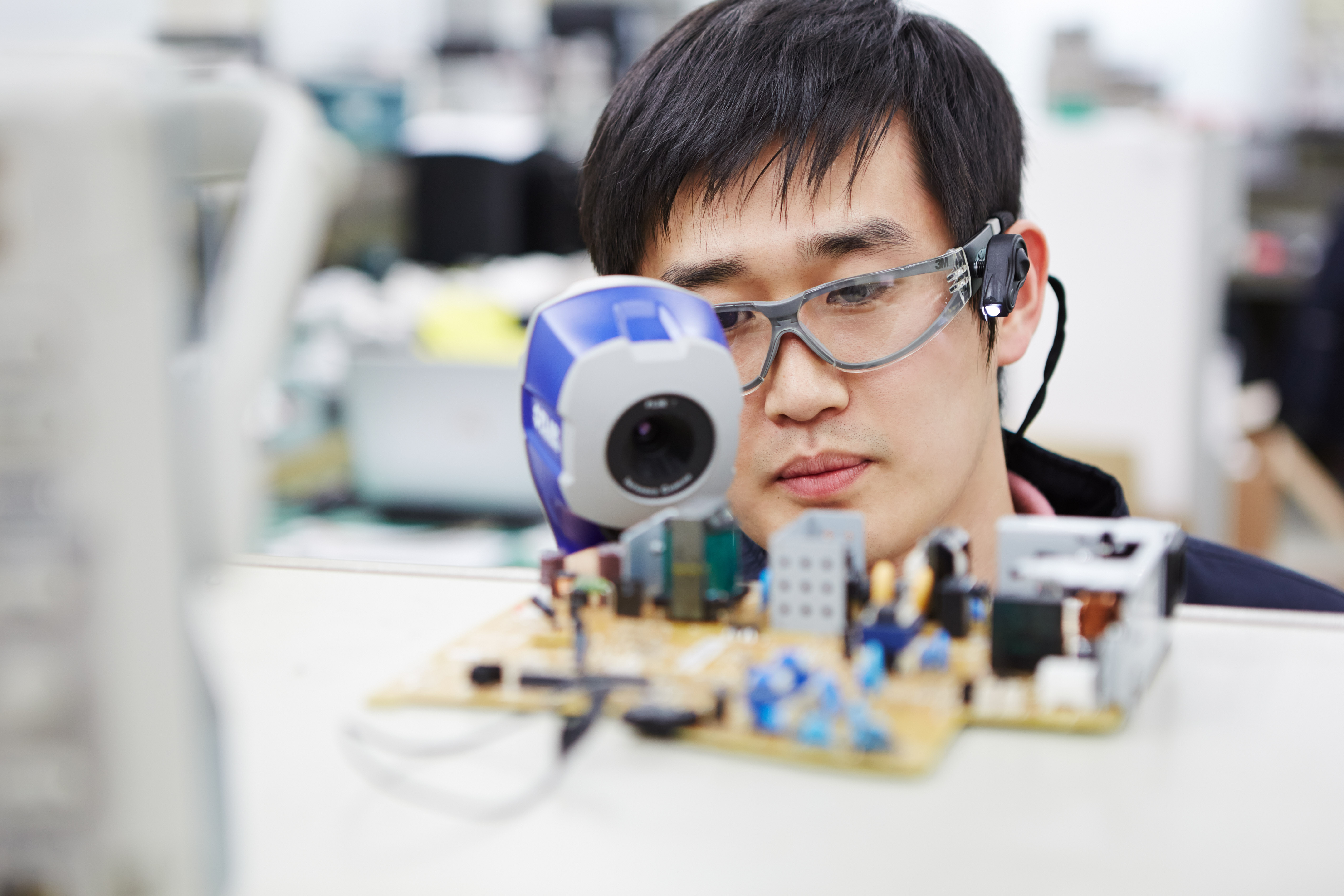 IT components testing Nemko Korea